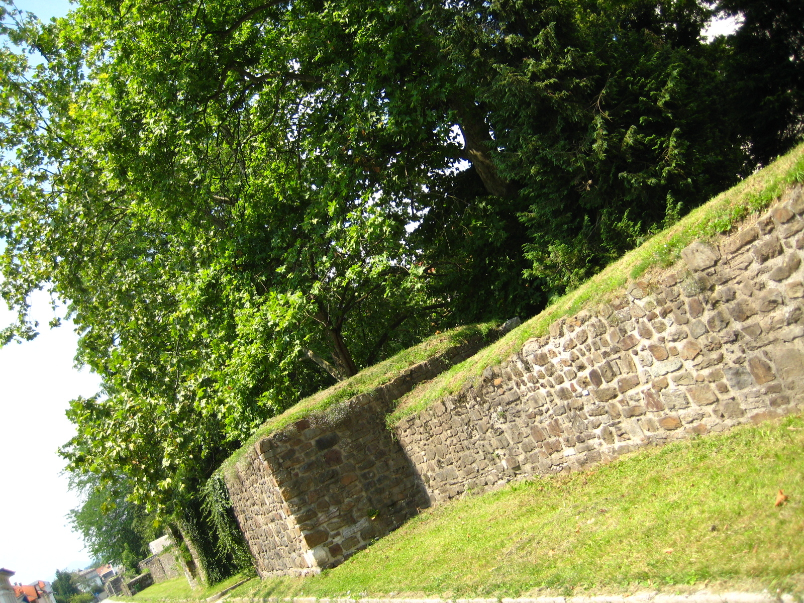 Rimski zid